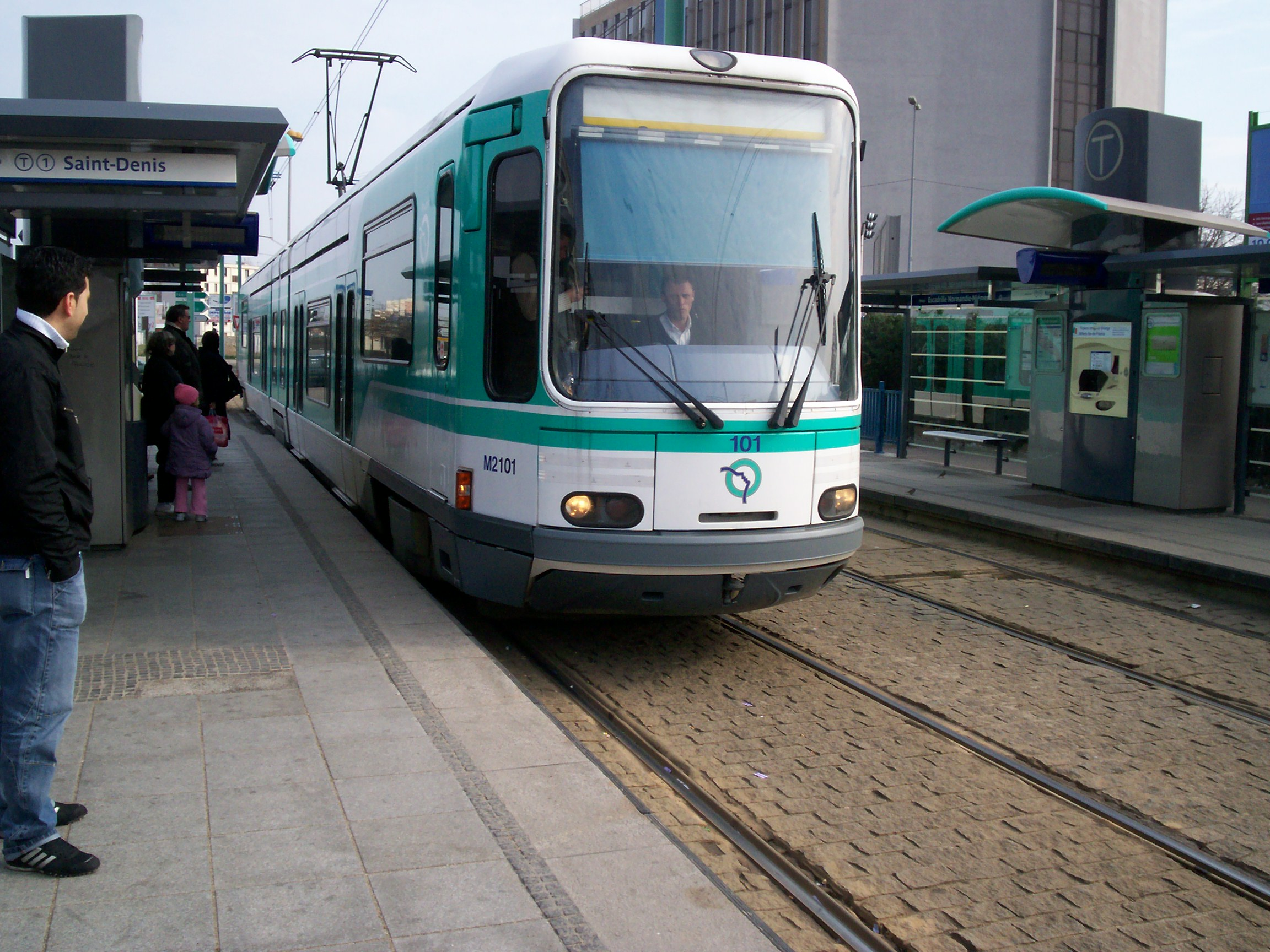 T1 à Escadrille Normandie-Niémen